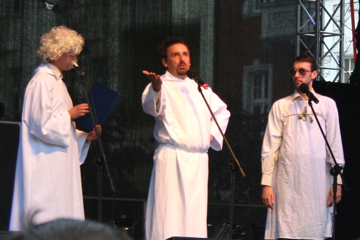 Kabaret Neo-Nówka podczas Dni Bytomia 2009.